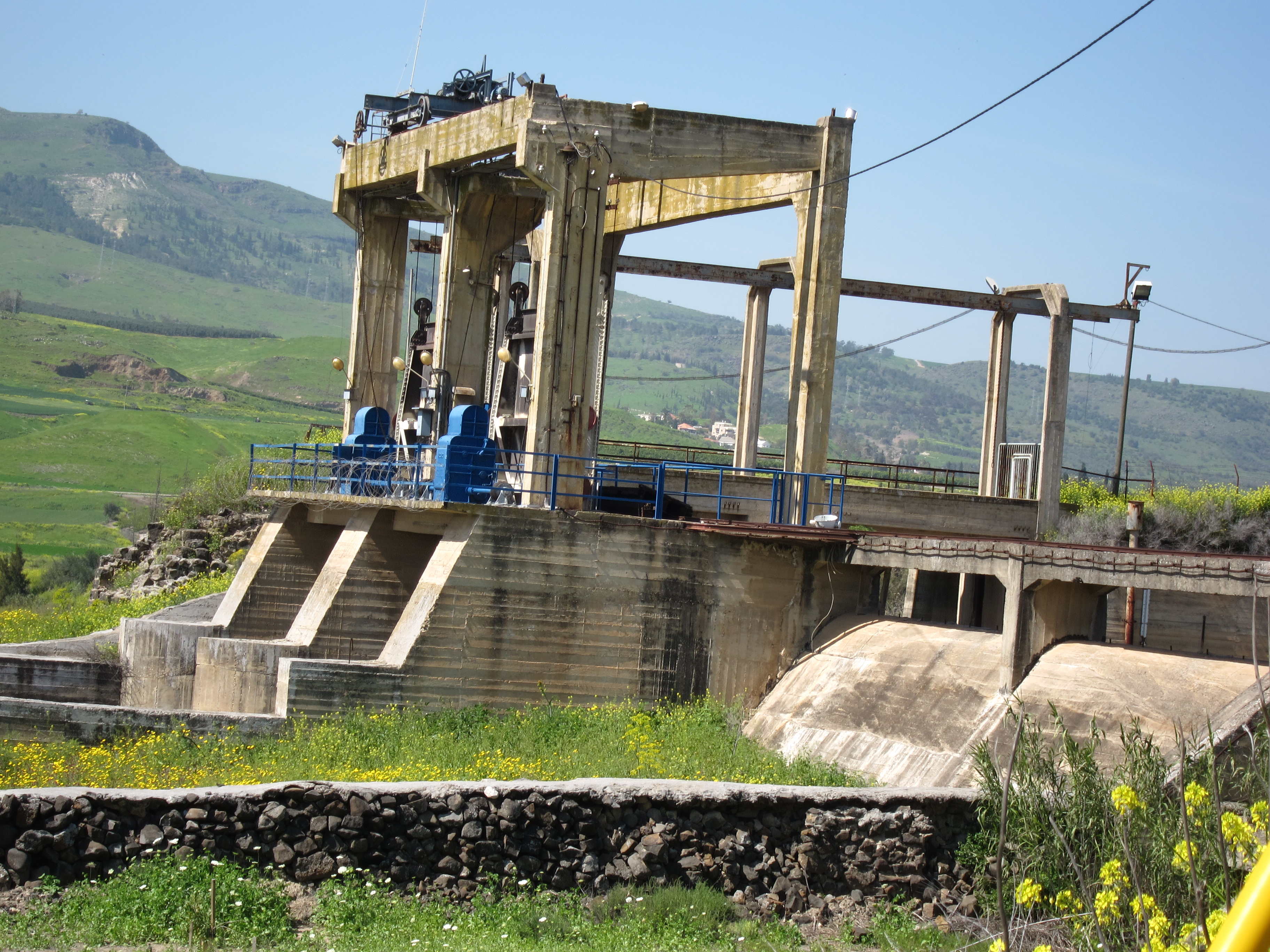 נהריים אי השלום 2012